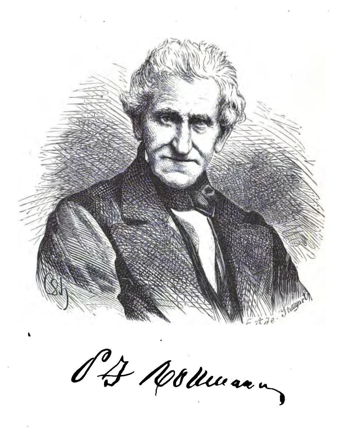 Peter Joseph Rottmann (1799-1881). In: Gedichte in Hunsrücker Mundart. 4. vermehrte Auflage. Kreuznach: R. Voigtländer.